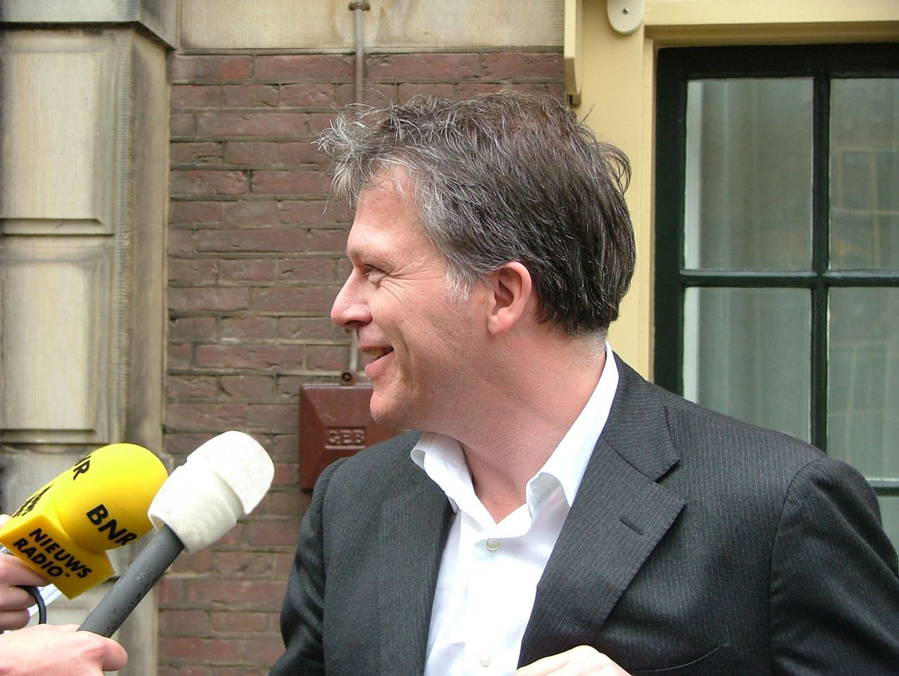 Foto van Wouter bos door Marco Raaphorst. "Meneer Bos , meneer Bos".